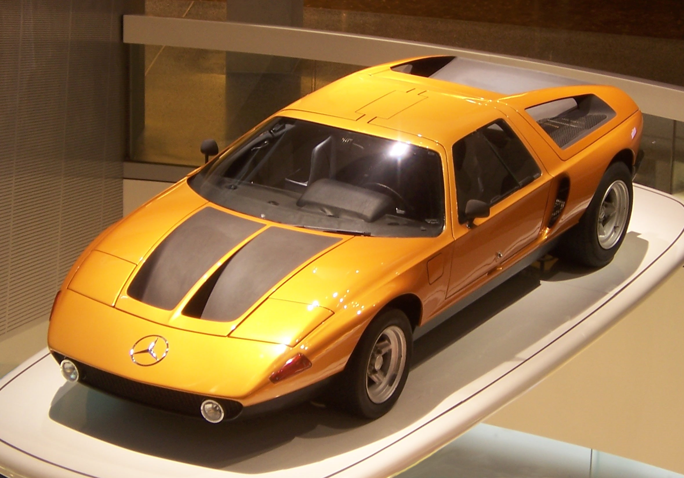 Mercedes-Benz C111 im Mercedes-Benz-Museum